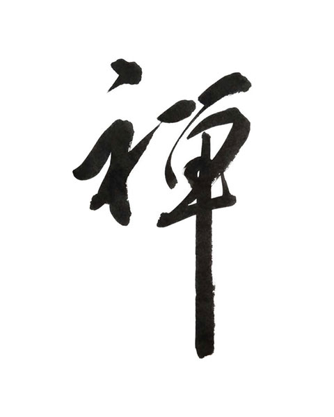 Chan (Zen) Kalligrafie von Shaolin Kung Fu Grossmeister Shi De Feng